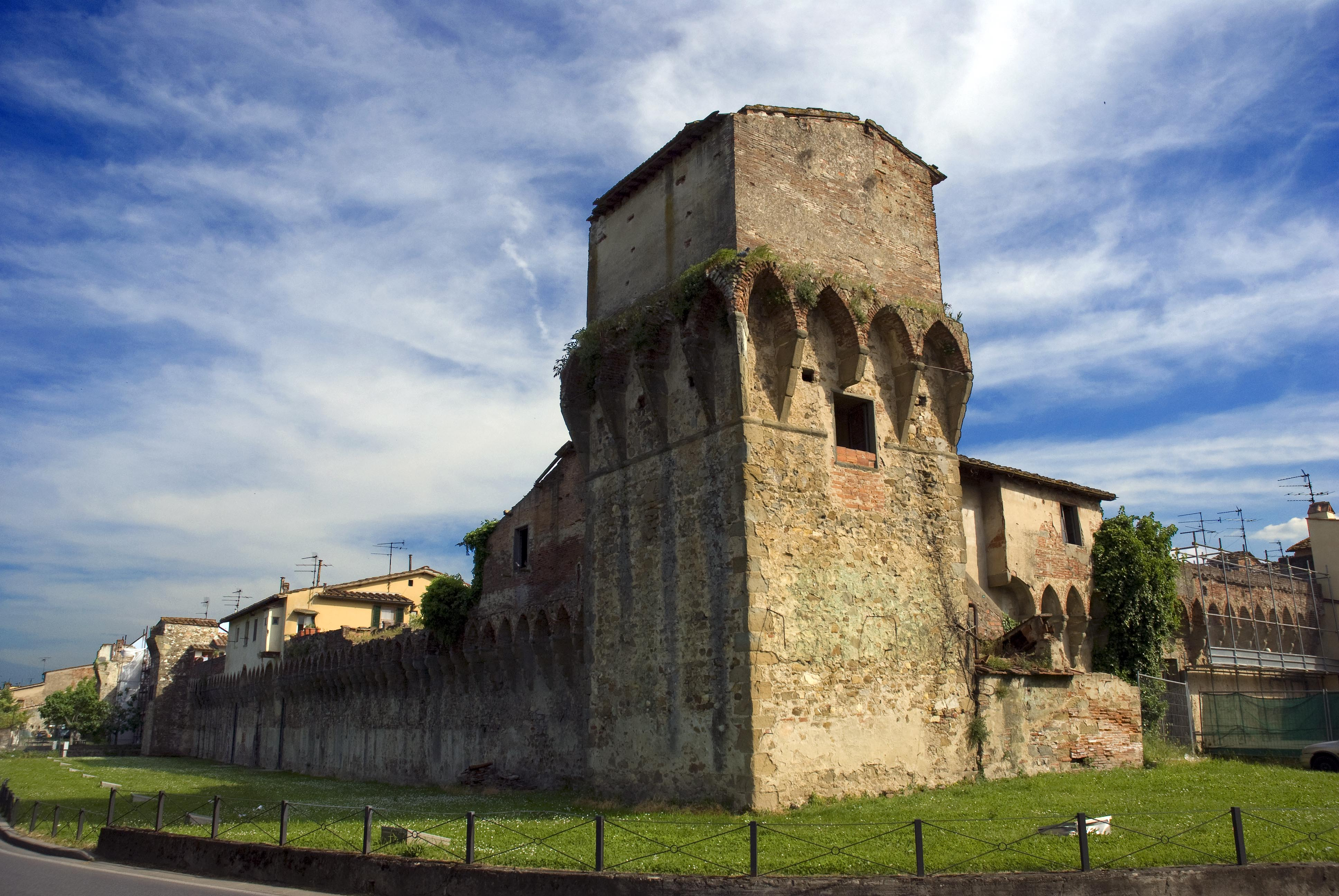 mura di lastra a signa